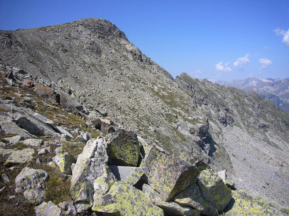 Pic de Morrano i Serra de les Mussoles vistes des de la Collada de Morrano; la Vall de Boí, Alta Ribagorça, Catalunya